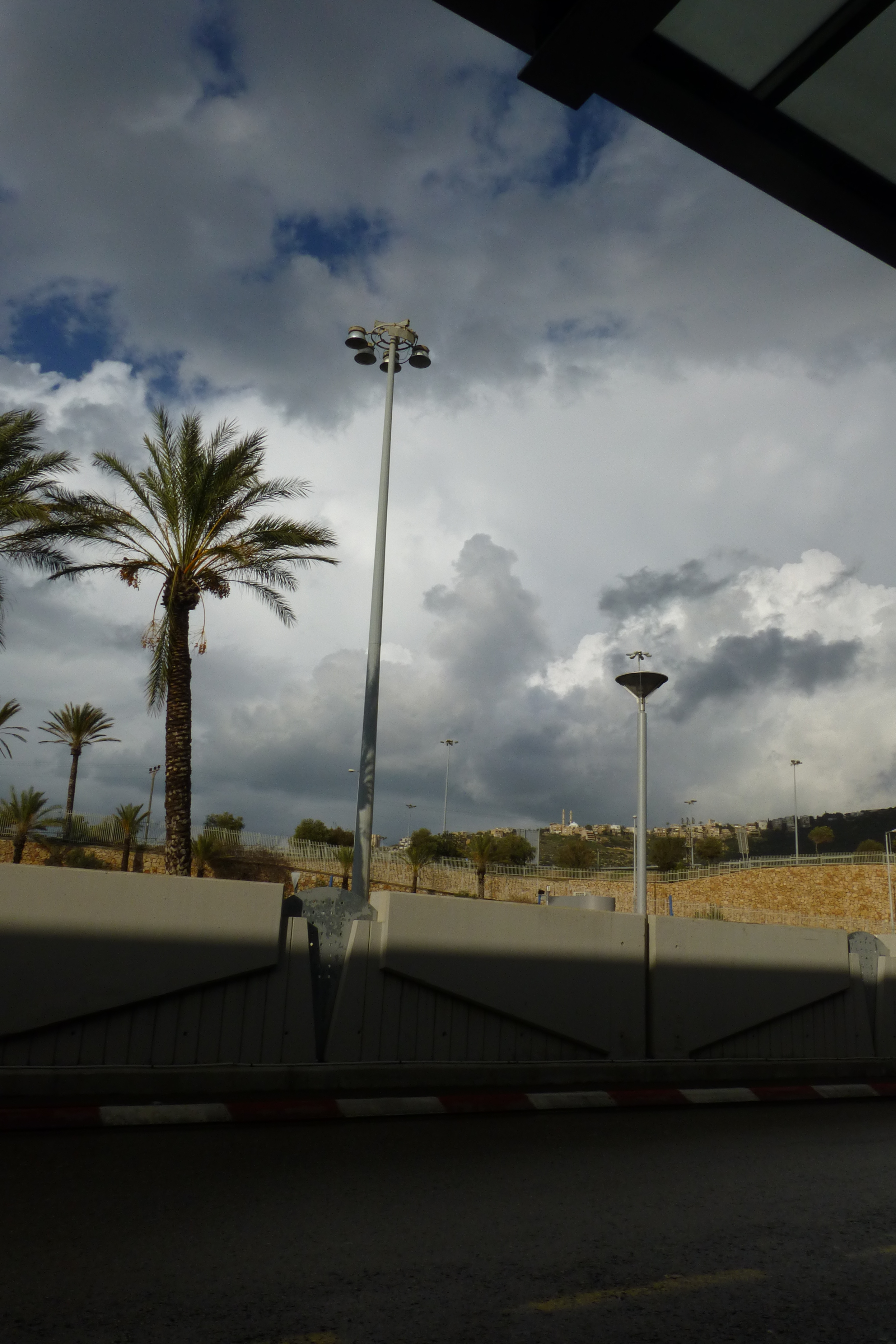 מסגד סיידנא מחמוד בשכונת כבביר בחיפה. מסגד זה משתייך לפלג האחמדים שנוסד בהודו ומטיף לנאורות, שלום ואהבה לאחר.